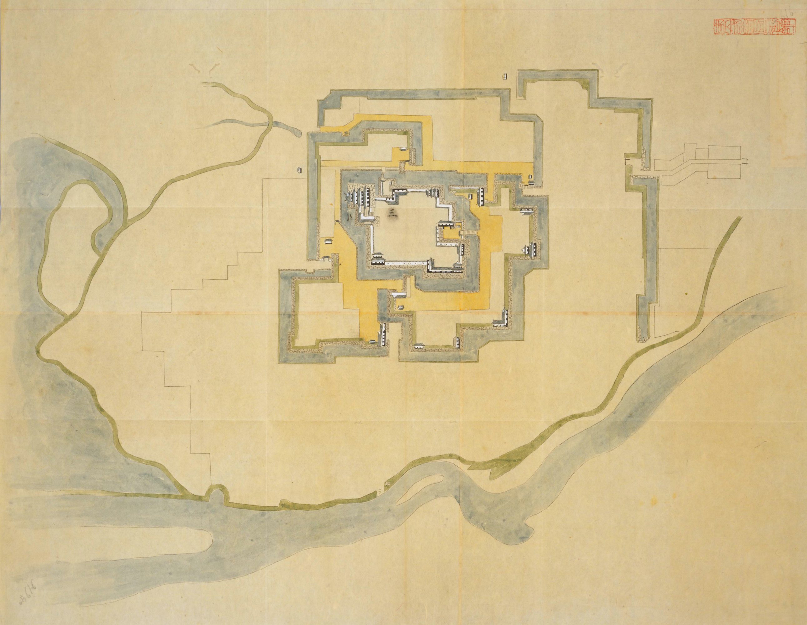 〔日本古城絵図〕 西海道之部（2）. 328 肥後国八代城〔江戸中期－末期〕